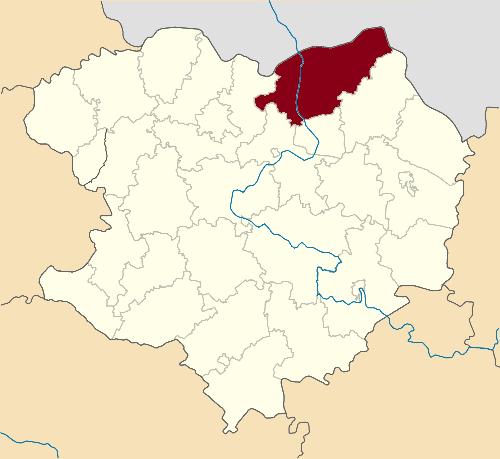 Vovchanskyi-Raion map